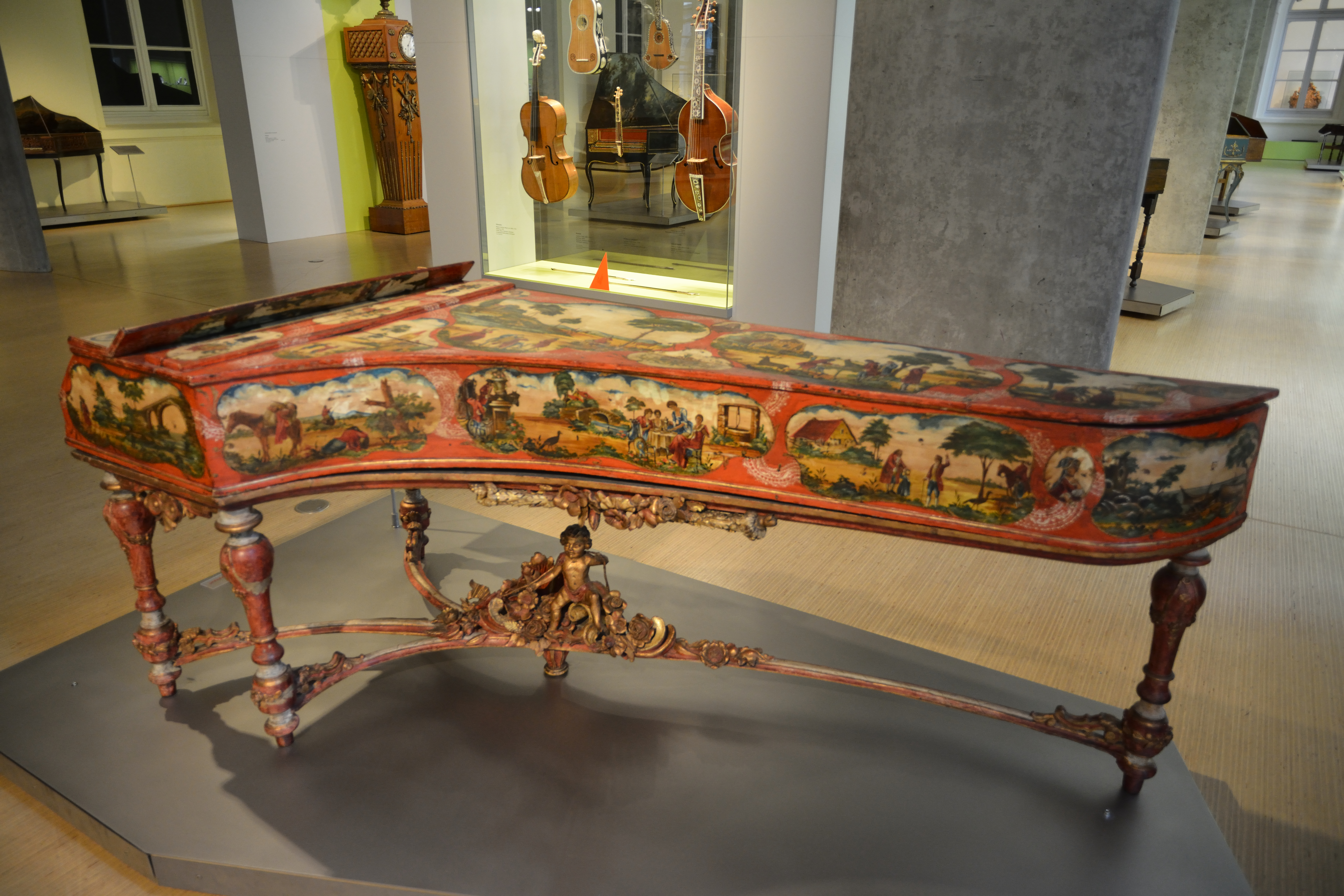 Impressionen vom GLAM-Event "Wiki Loves Musik" in Hamburg. Ausstellung im Musiksaal 1 im Museum für Kunst und Gewerbe Hamburg. Einmanualiges Cembalo von Vincenzo Sodi, Florenz, 1778.